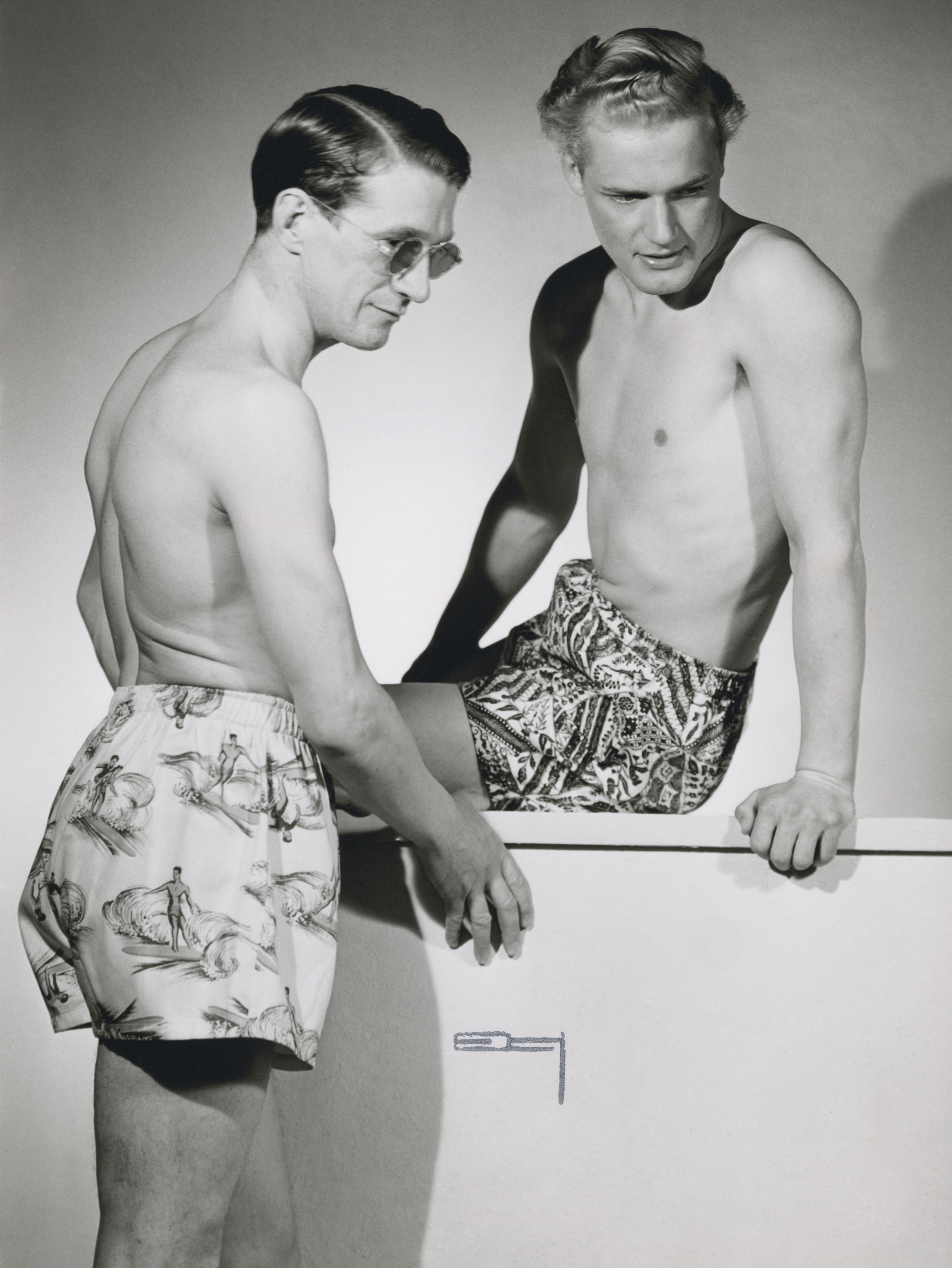 Två män i bar överkropp och badbyxor. Den ena badbyxan med mönster av surfande figurer och höga vågor. Nordiska Kompaniet. Från Nordiska Kompaniets kampanj med Californiakläder i maj 1947. Ämnesord: Bad, Fritidssysselsättning, Kläder : Herrkläder, Mode.